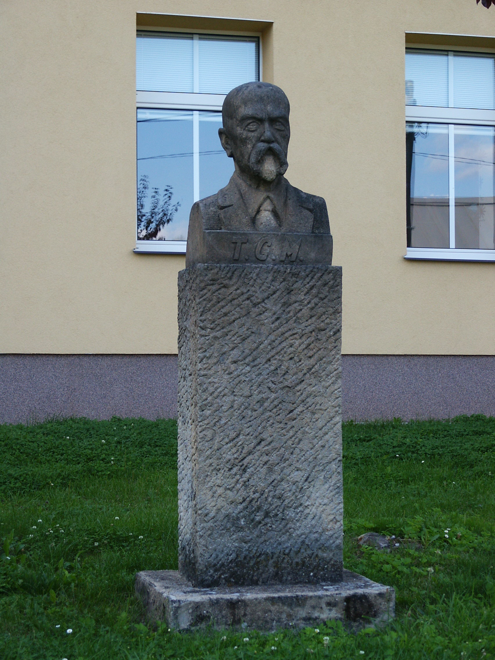 Martinice - busta T. G. Masaryka